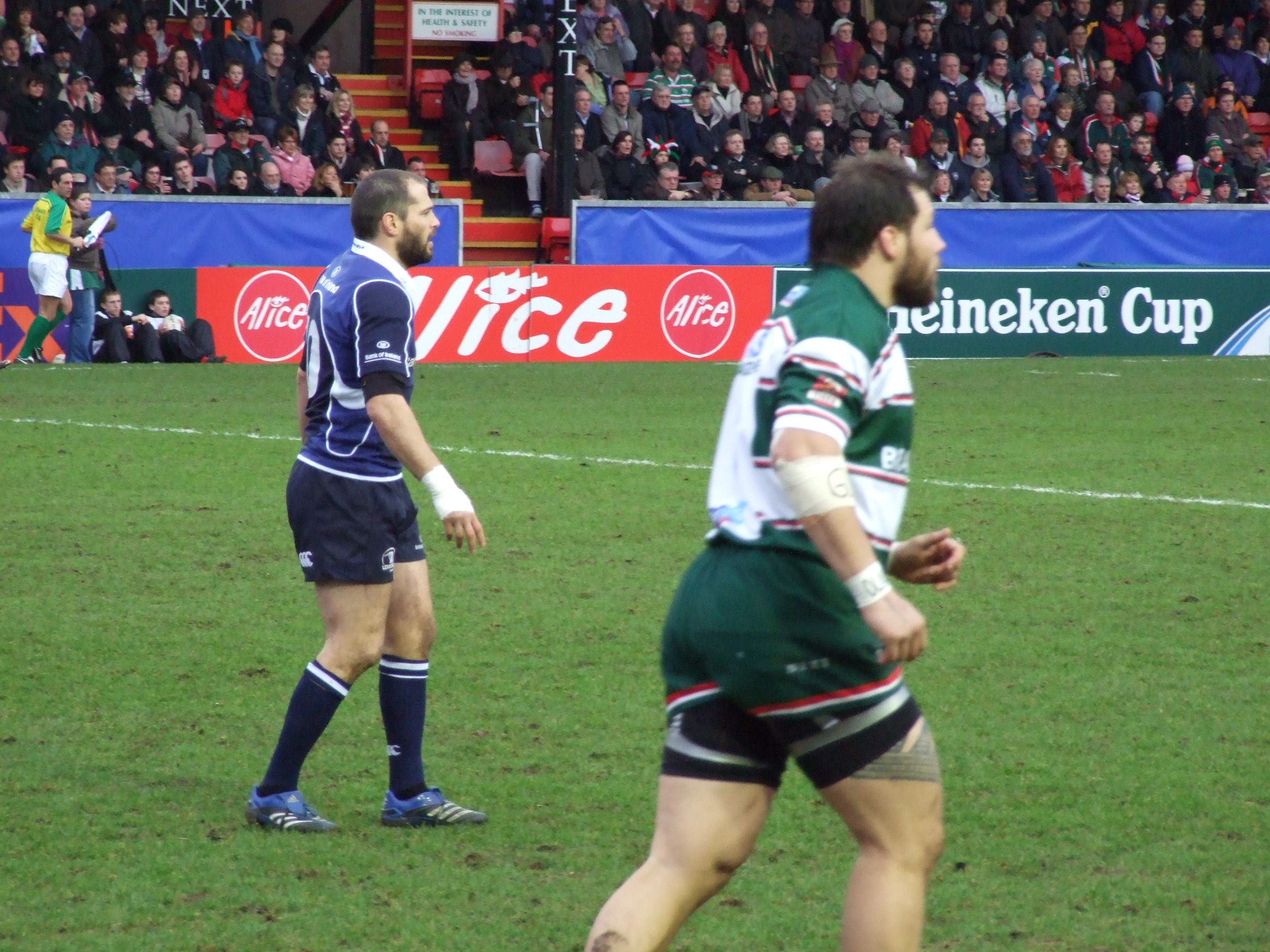 Leicester Tigers v Leinster - 19 January 2008 (21) Martin Castrogiovanni, Felipe Contepomi - Poule 6 6°journée Heineken Cup - Welford Road, Leicester Leicester Tigers 25 - 9 Leinster